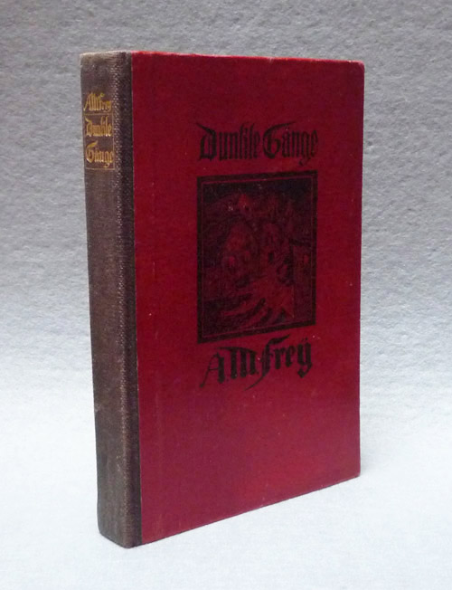 Alexander Moritz Frey - Dunkle Gänge, Originalausgabe, Delphin-Verlag, München 1913